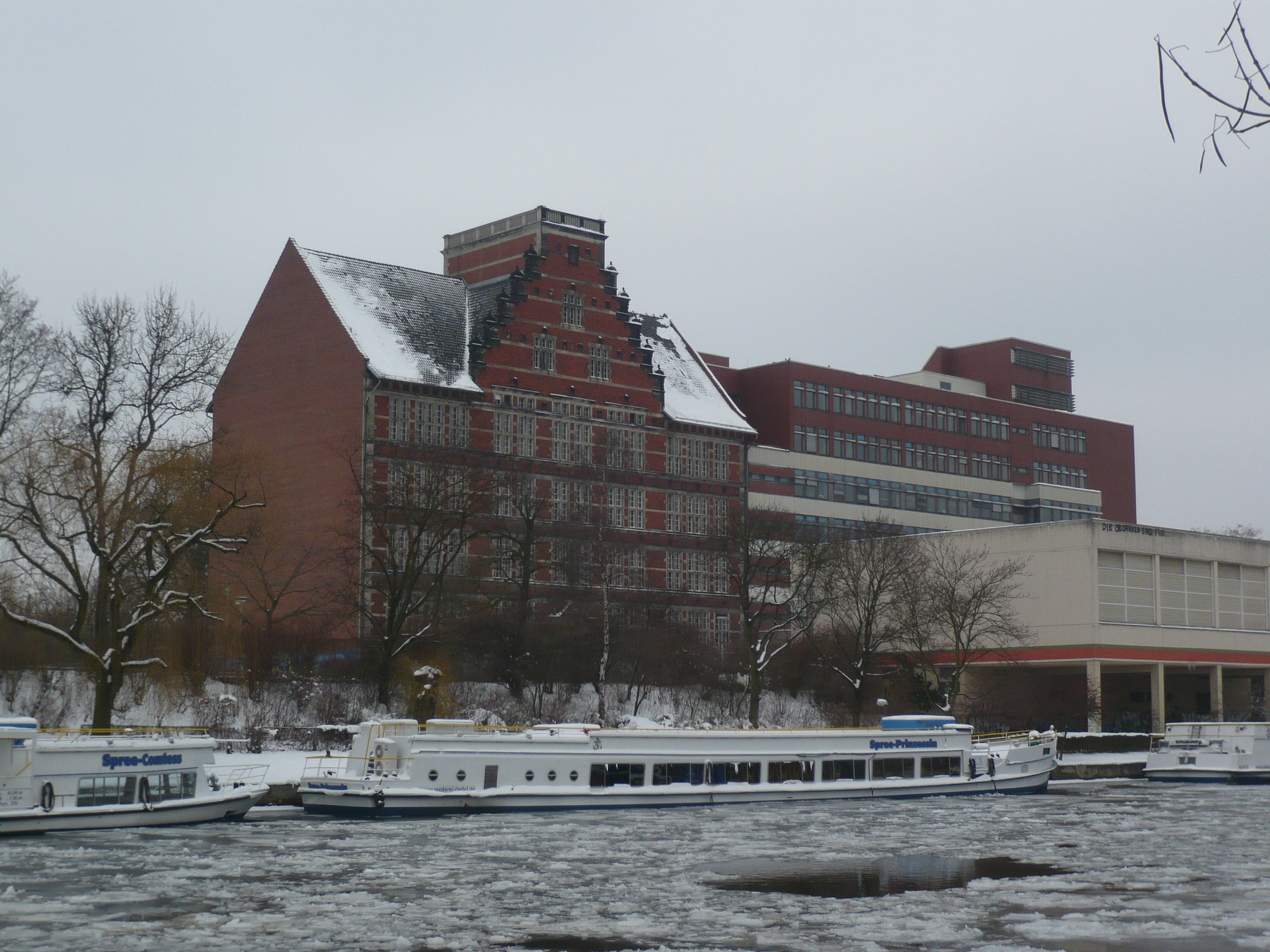 Blick über die Spree vom Standort des eh. Borsigstegs in Berlin